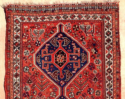 Deze foto van mijn eigen tapijt heb ik zelf gemaakt, u kunt deze foto ook vinden op mijn site ( met een beschrijving van het kleed. Correspondentie over het gebruik van deze foto kunt u voeren via via mijn site: Arie M. den Toom Ridderkerk 10 januari 2006